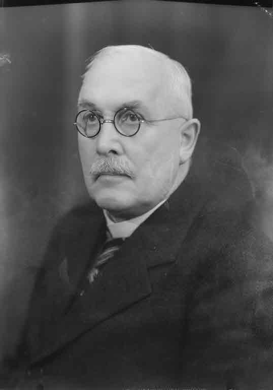 Presseporträt: Ständerat Dr. Carl Moser (Kanton Bern, Schweiz)